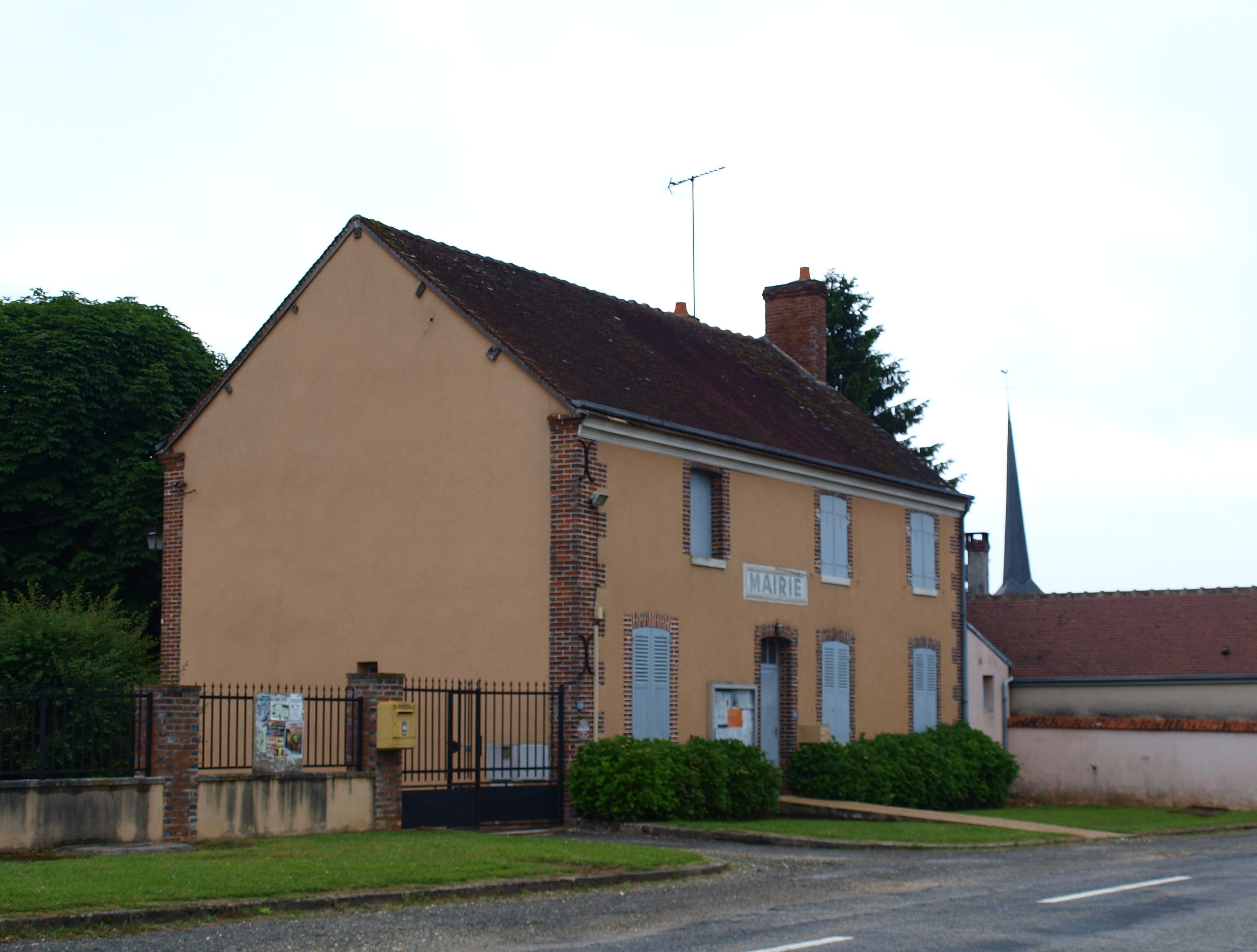 La Chapelle-Saint-Sépulcre (Loiret, France)